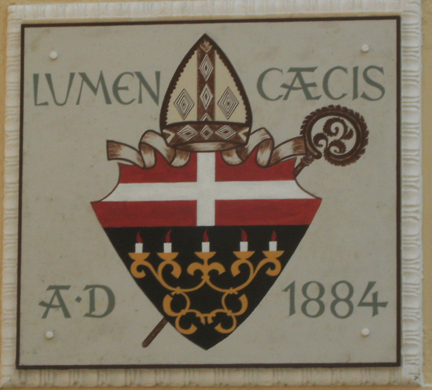 Erzabtei St. Ottilien - Wappen des Klosters über Eingang Pforte